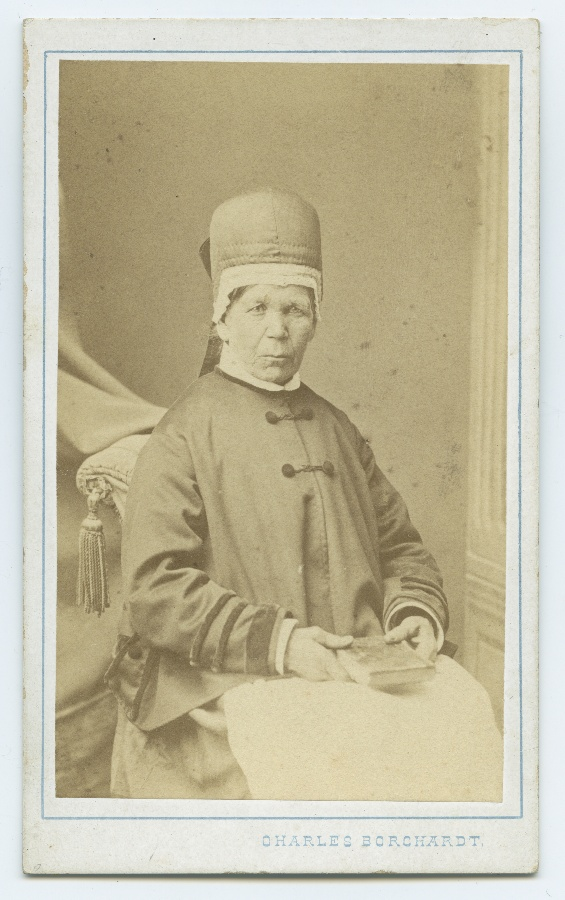 Muuseumikogu fotod Olemus foto Originaal originaal Säilivus rahuldav